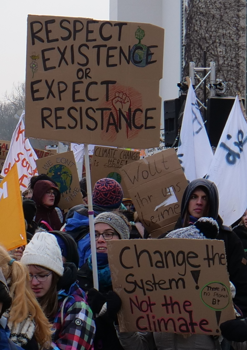 Zwischenkundgebung der FridaysForFuture Demonstration vor dem Kanzleramt am 25. Januar 2018 in Berlin.